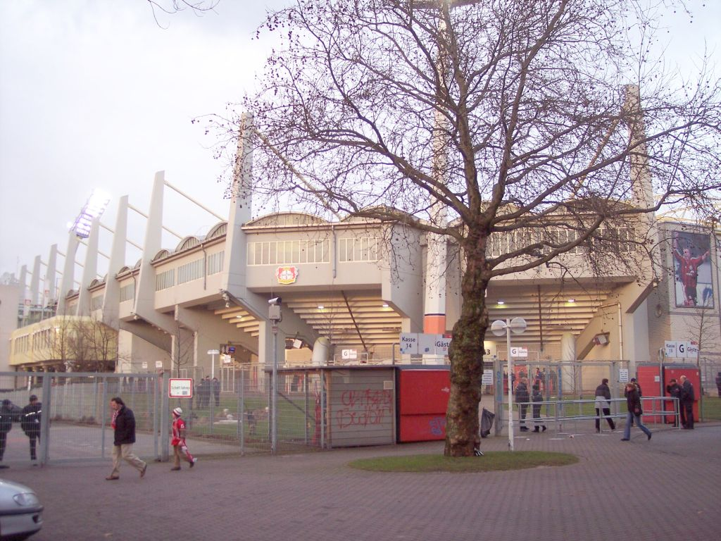 BayArena Leverkusen (Bay. Leverkusen - FSV Mainz 05 2:0)